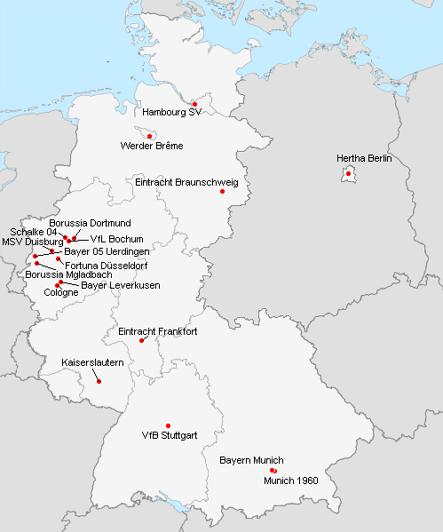 Répartition des clubs en 1.Bundesliga 1979-1980.